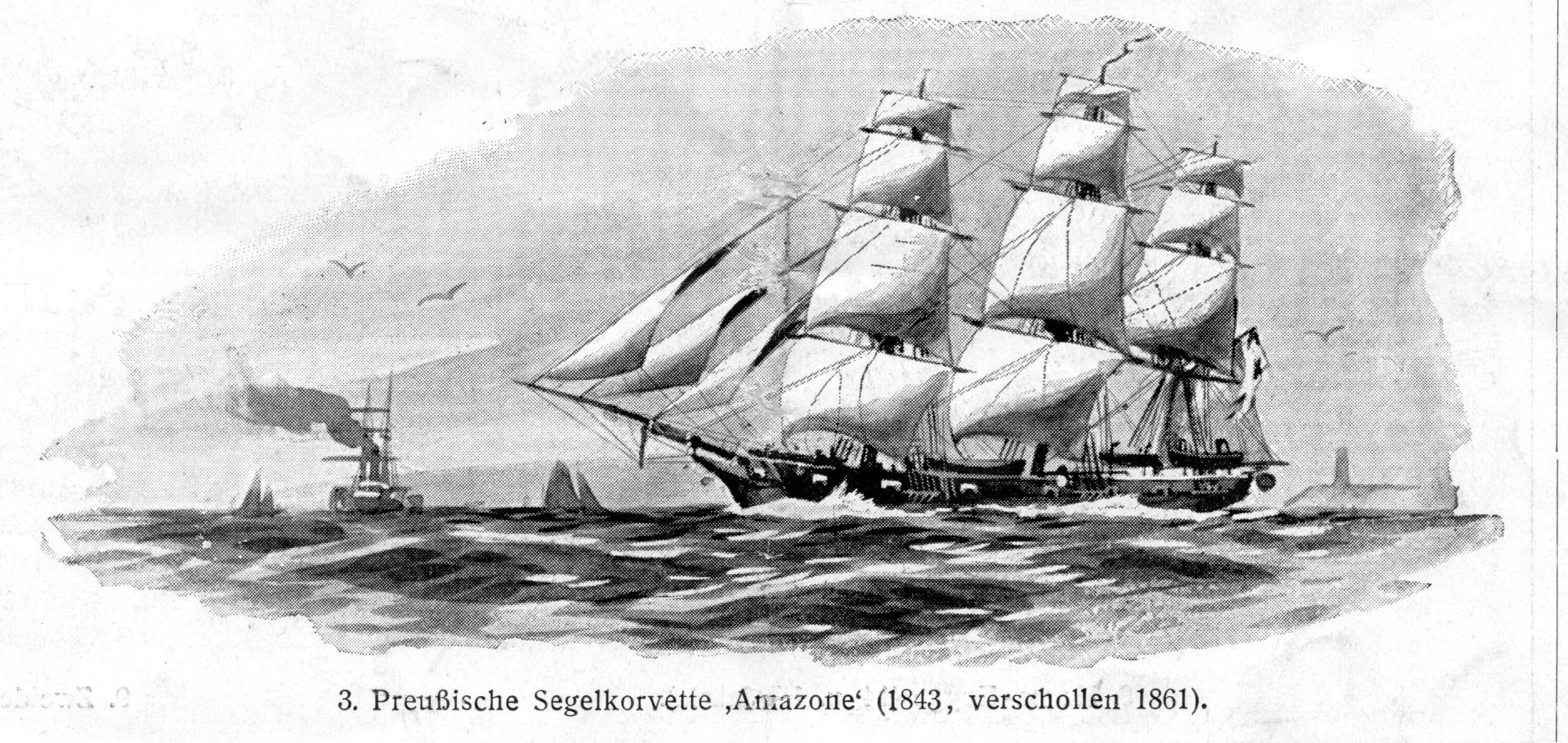 SMS AMAZONE